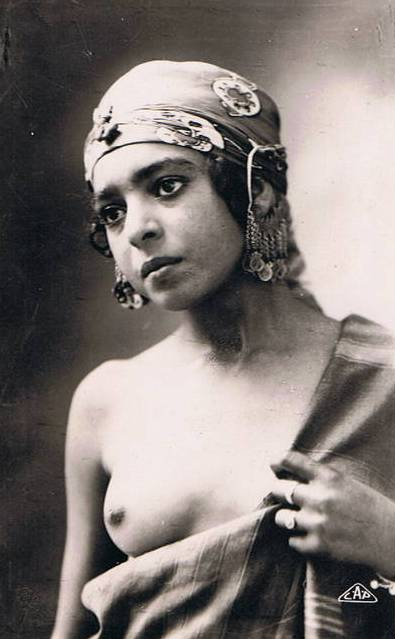 Compagnie des Arts Photomécaniques postcard